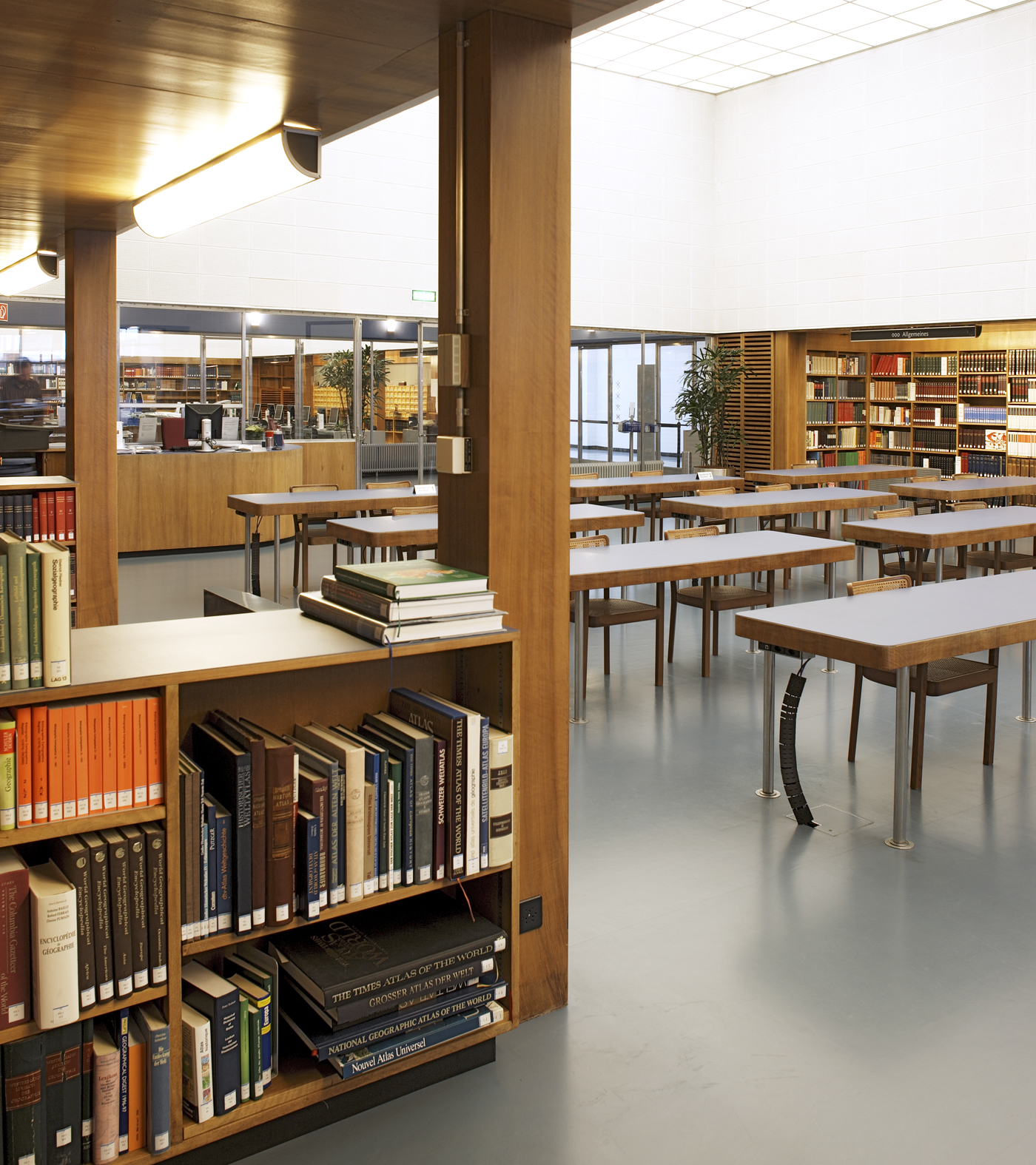 Schweizerische Nationalbibliothek - Ebene1 Lesesaal Nische